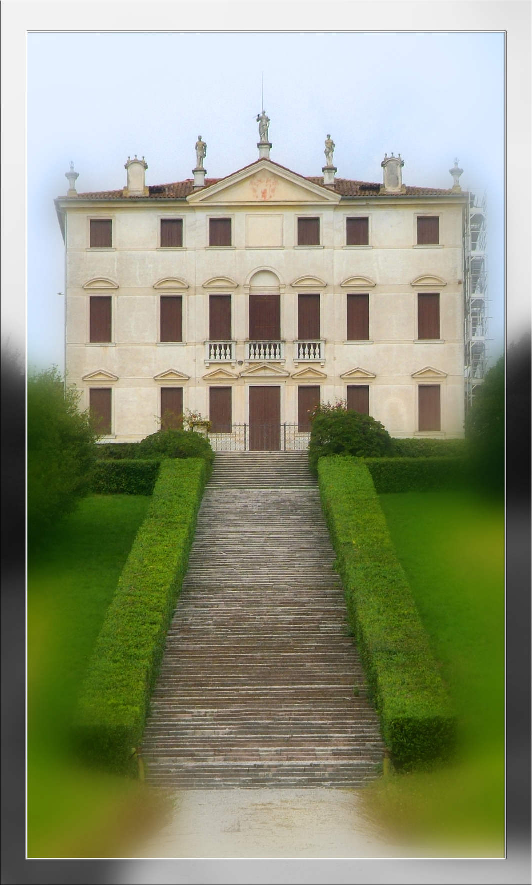 Villa Negri Piovene